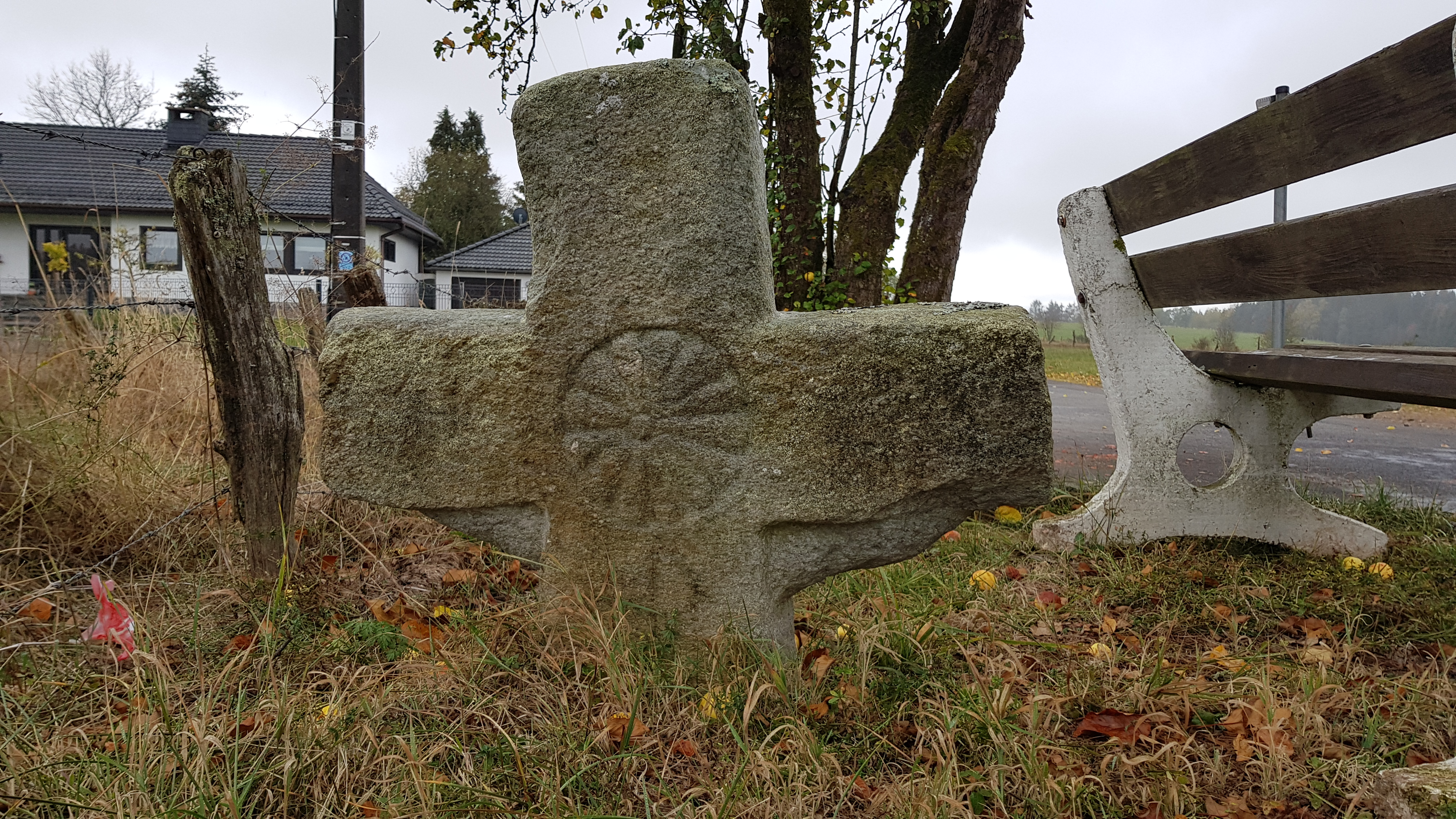 Kreuz auf der Flins, Medendorf, Büllingen, Belgien This photo of immovable heritage has been taken in the Walloon Region